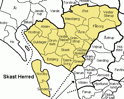 Skast Herred Ribe Amt, Denmark Map by Svend-Erik Christiansen , edited by Nico-dk.